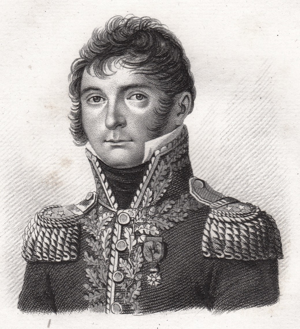 Général_Samuel_François_Lhéritier_de_Chézelles 1772-1829